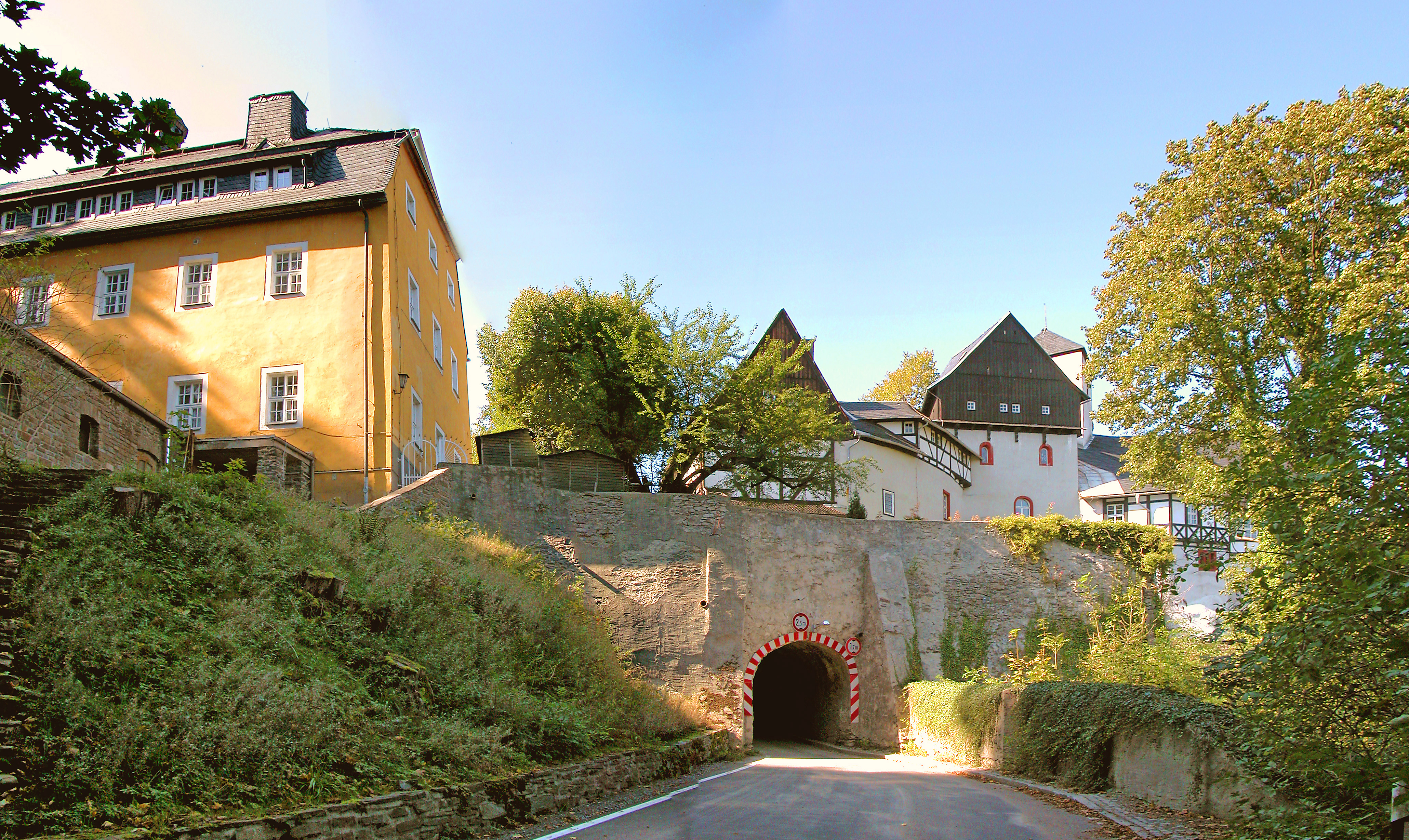 24.09.2006 09514 Rauenstein (Pockau-Lengefeld), Rauenstein 4 (GMP: 50.728442,13.201055): Schloß Rauenstein. Mittelalterliche Burg (13./14. Jh.), um 1630 Umbauten und Erweiterungen. In der DDR Kindererholungsheim. 1999 von Carl-Wilhelm von Herder reprivatisiert. Die Straße untertunnelt das Schloß in der Kellereben. Sicht von Osten. Nicht öffentlich zugänglich. [DSCN11694-11696.TIF]20060924255MDR.JPG(c)Blobelt